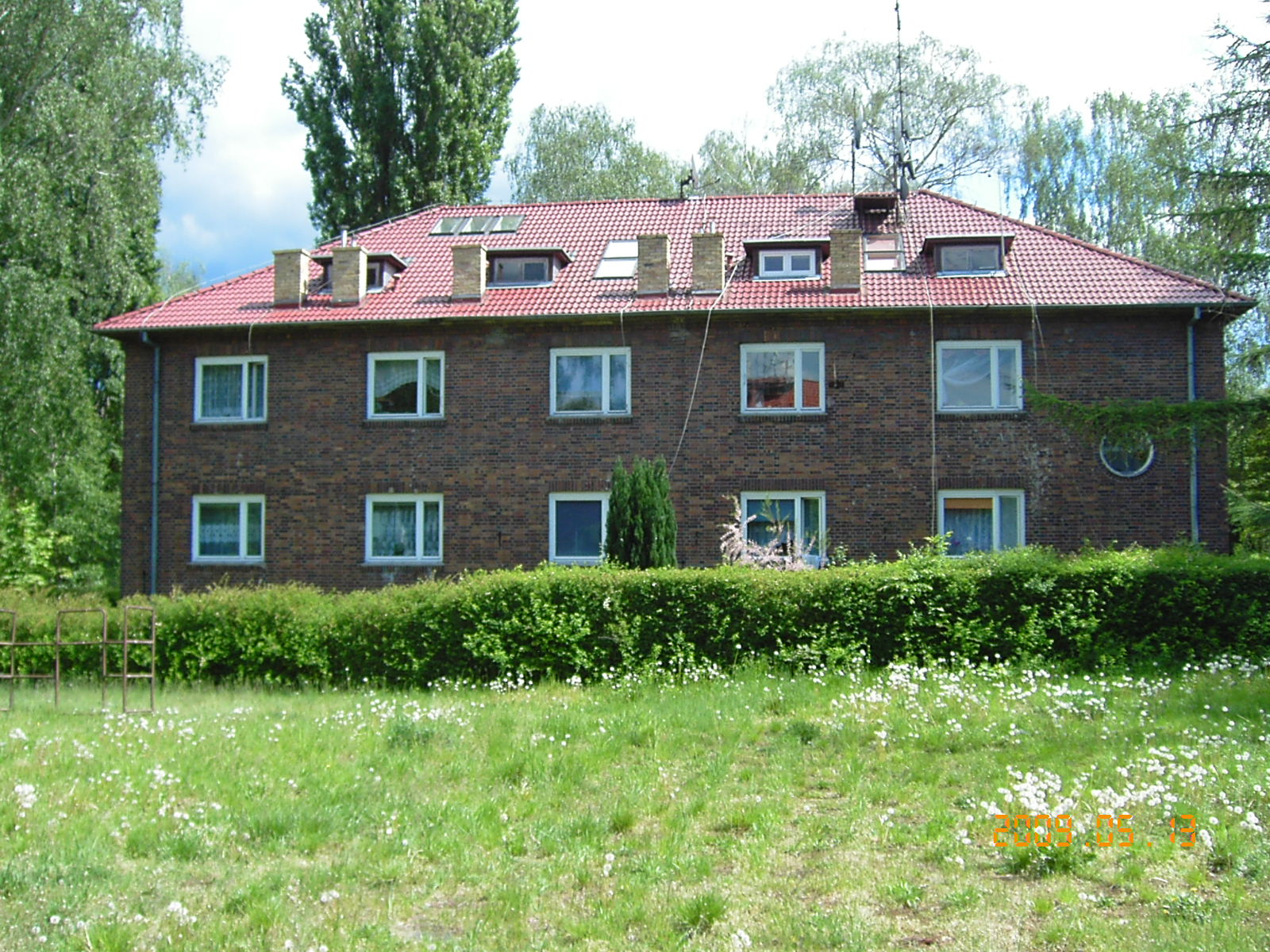 Byłe koszary WOP przy ulicy Przestrzennej w Szczecinie